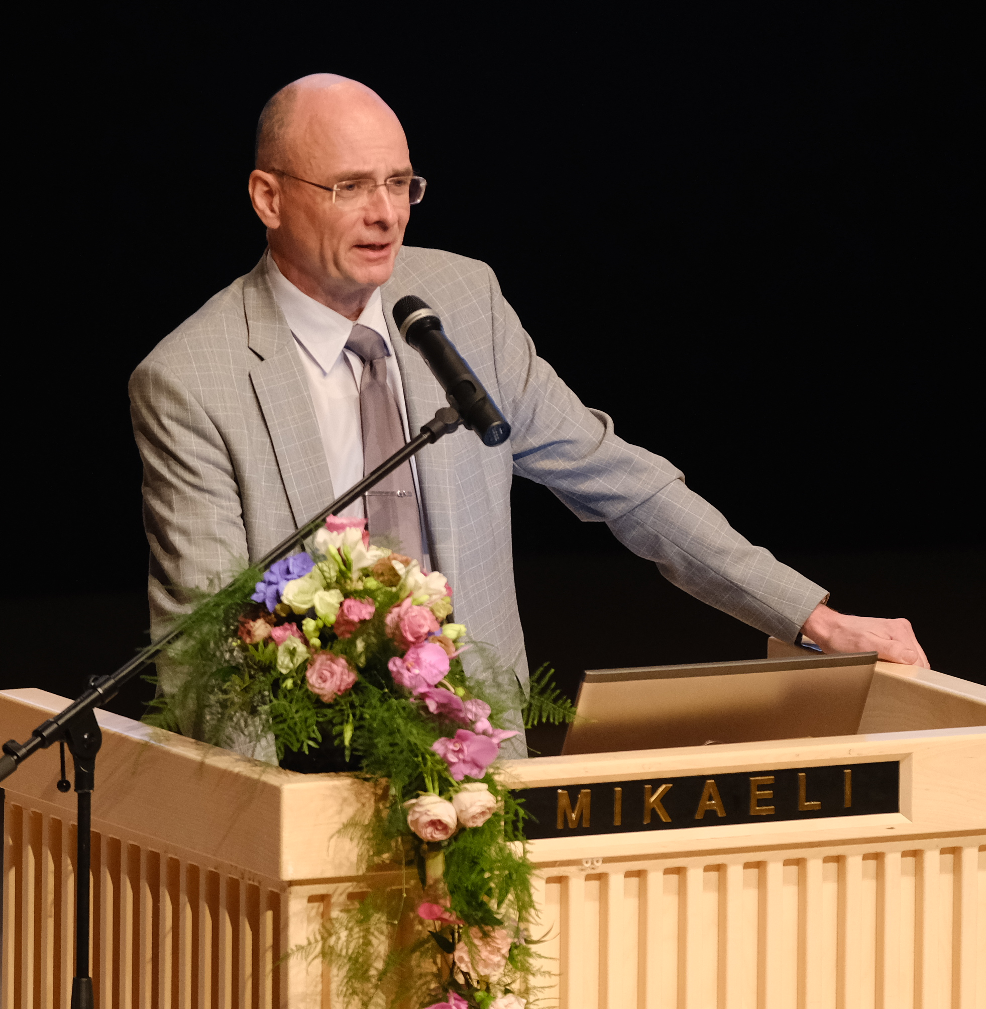 Mikkelin kaupungin tervehdys, kaupunginjohtaja Timo Halonen.